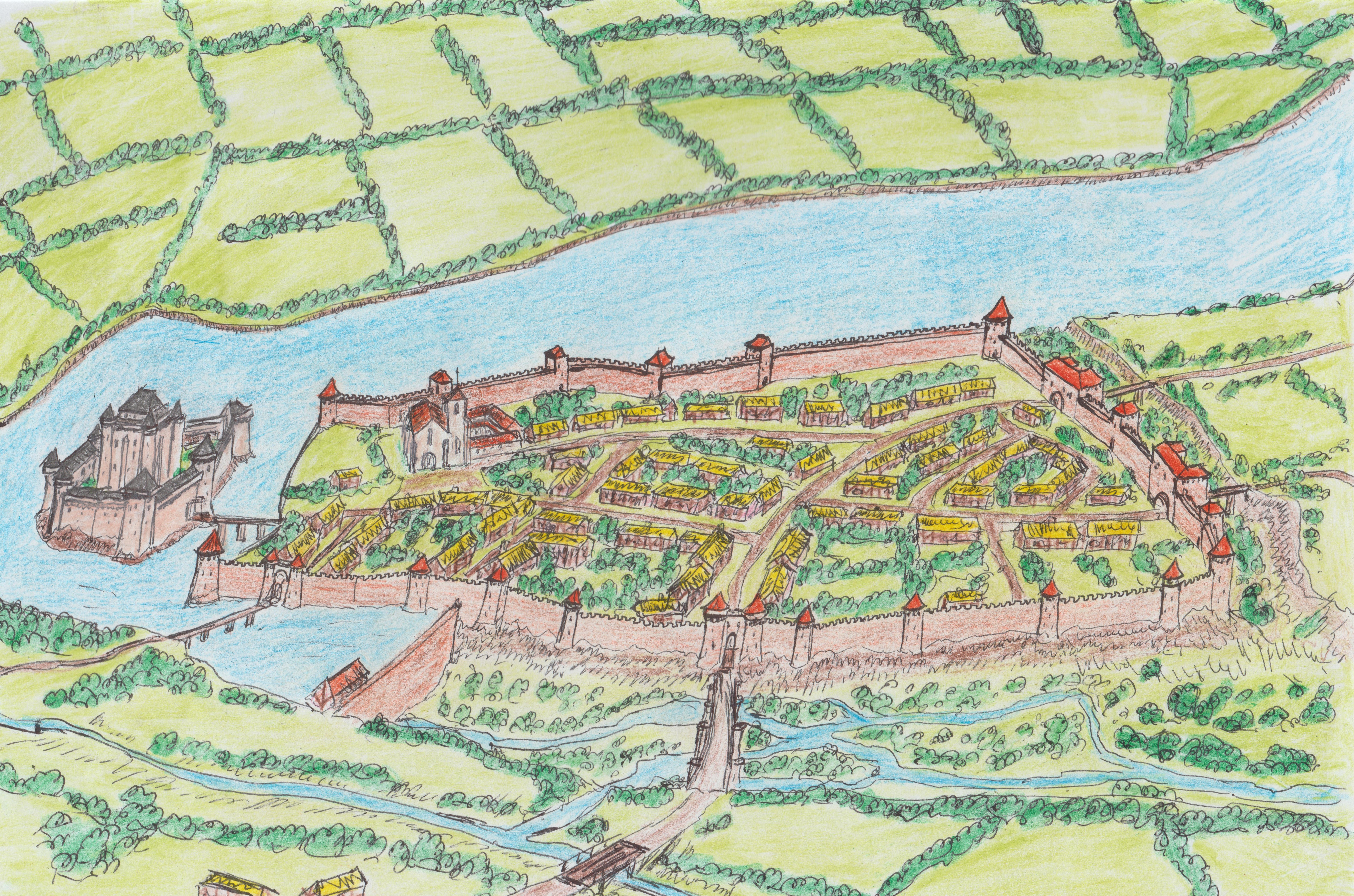 Dessin en couleurs montrant une reconstitution possible des fortifications urbaines et du château baronnial de Sainte-Hermine vers le début du XVe siècle.